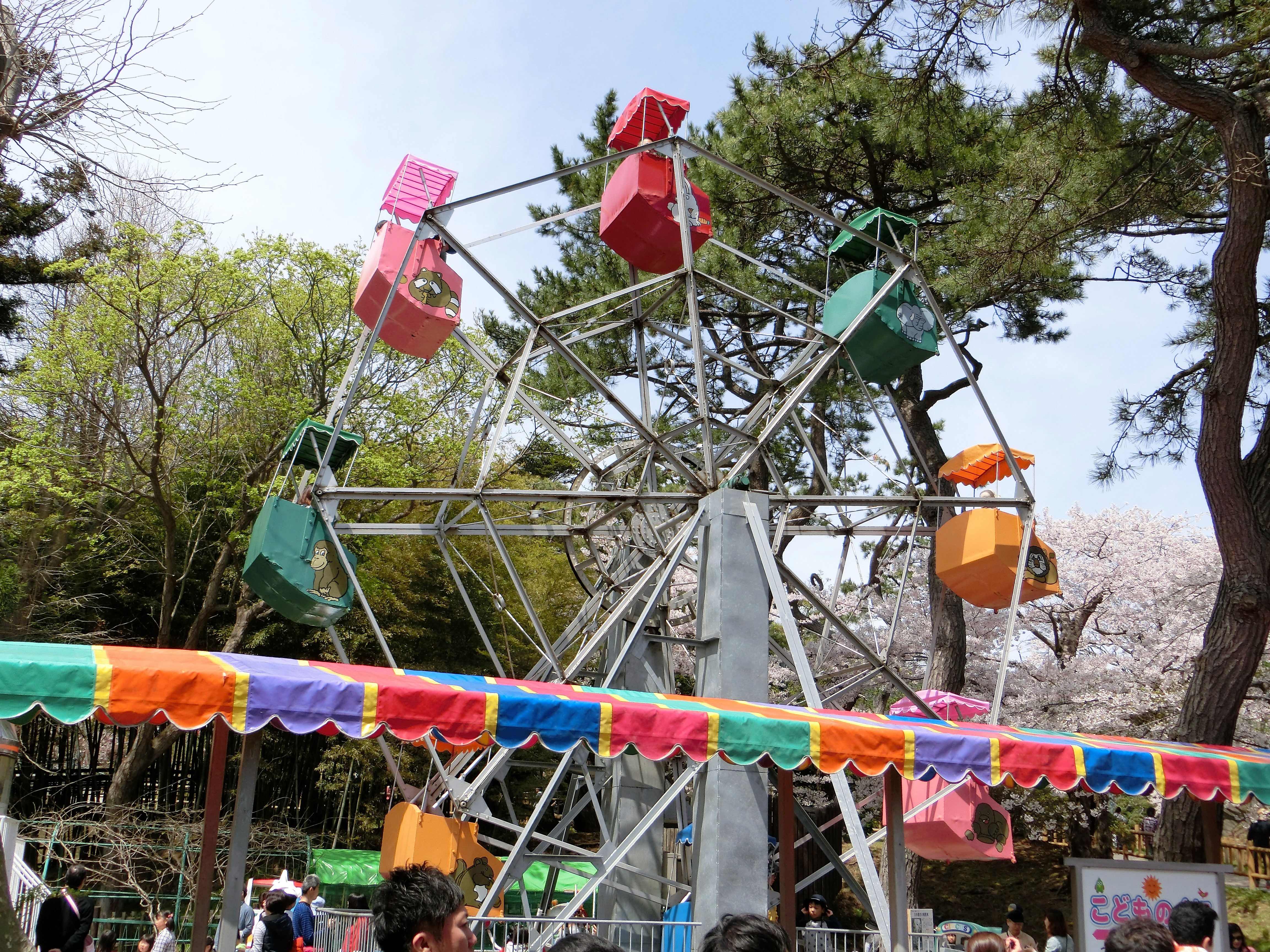 日本最古の観覧車（函館公園こどものくに）